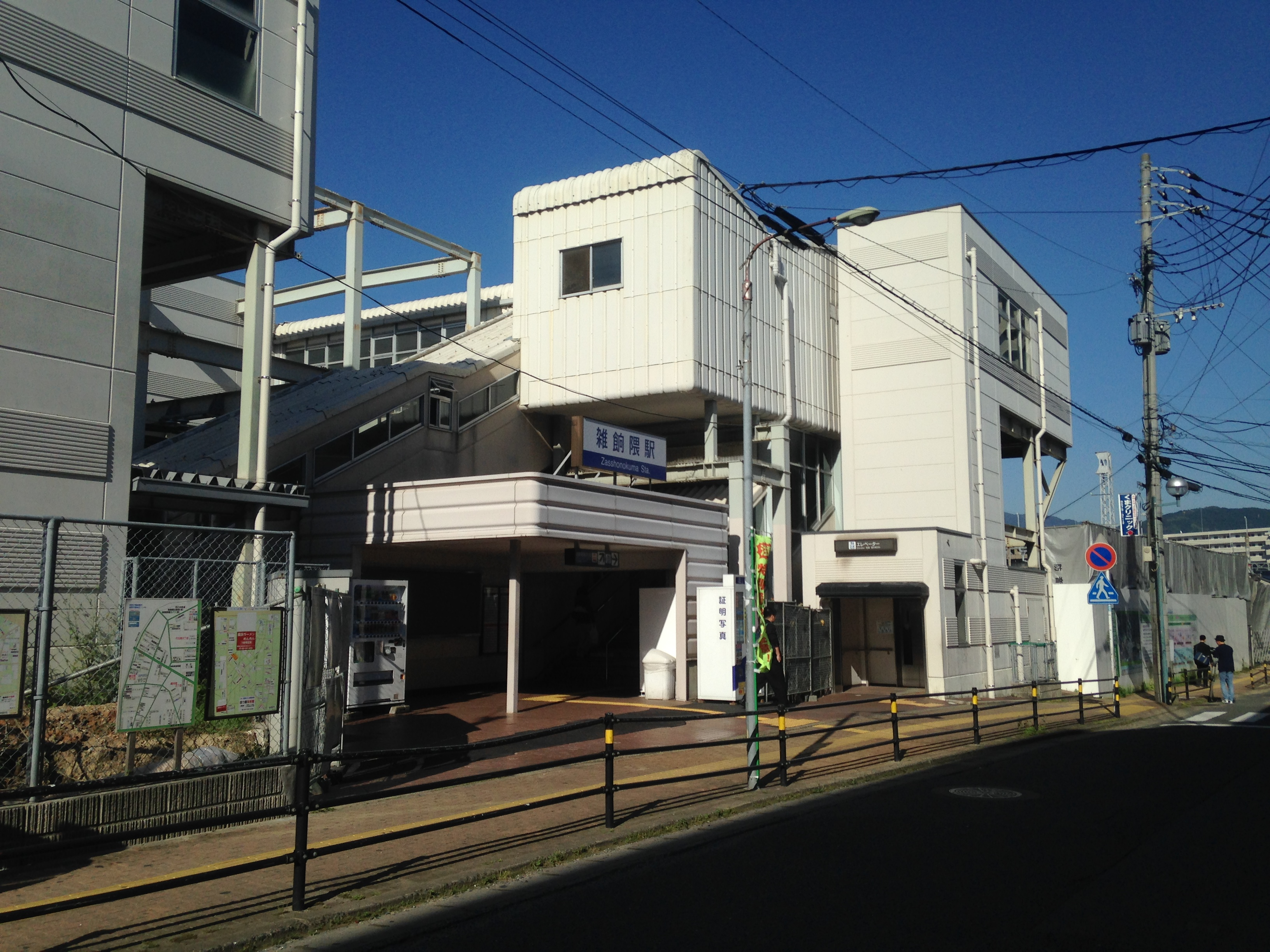 雑餉隈駅駅舎の遠景